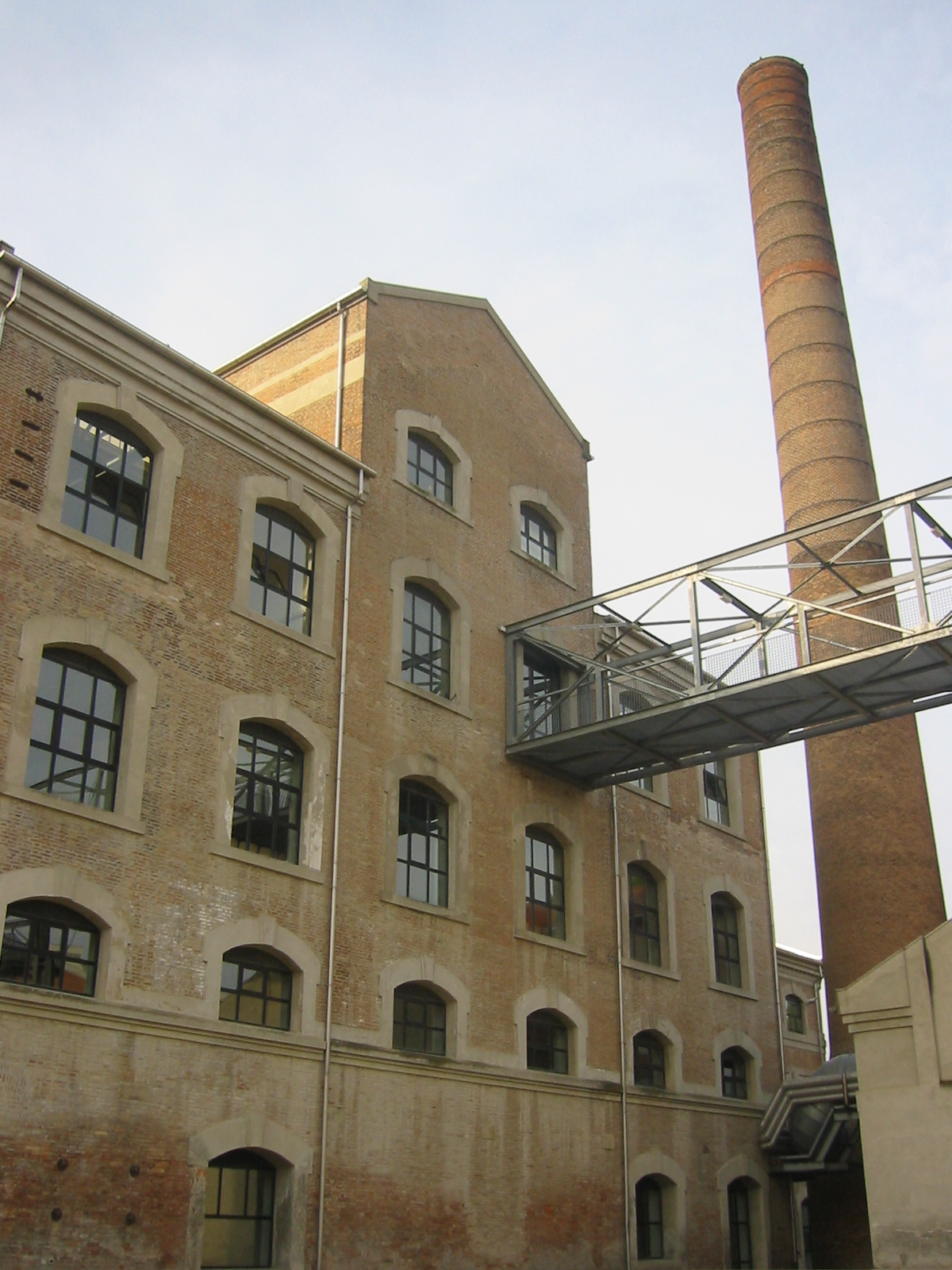 La ex Fabbrica Eridania a Ferrara.